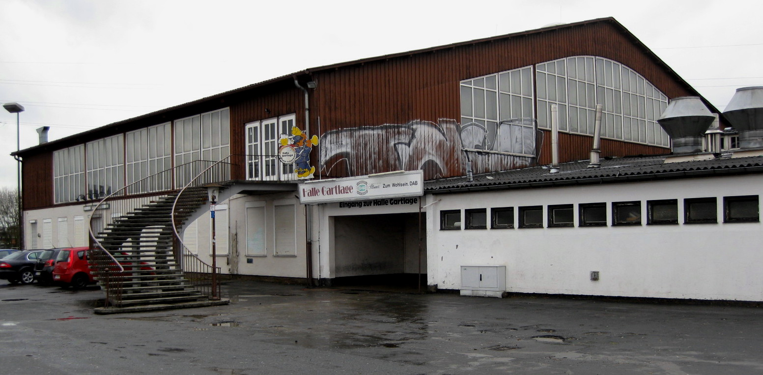 Die Halle Gartlage in Osnabrück, Stadtteil Gartlage, 1954 errichtet, Viehauktions- und Veranstaltungshalle